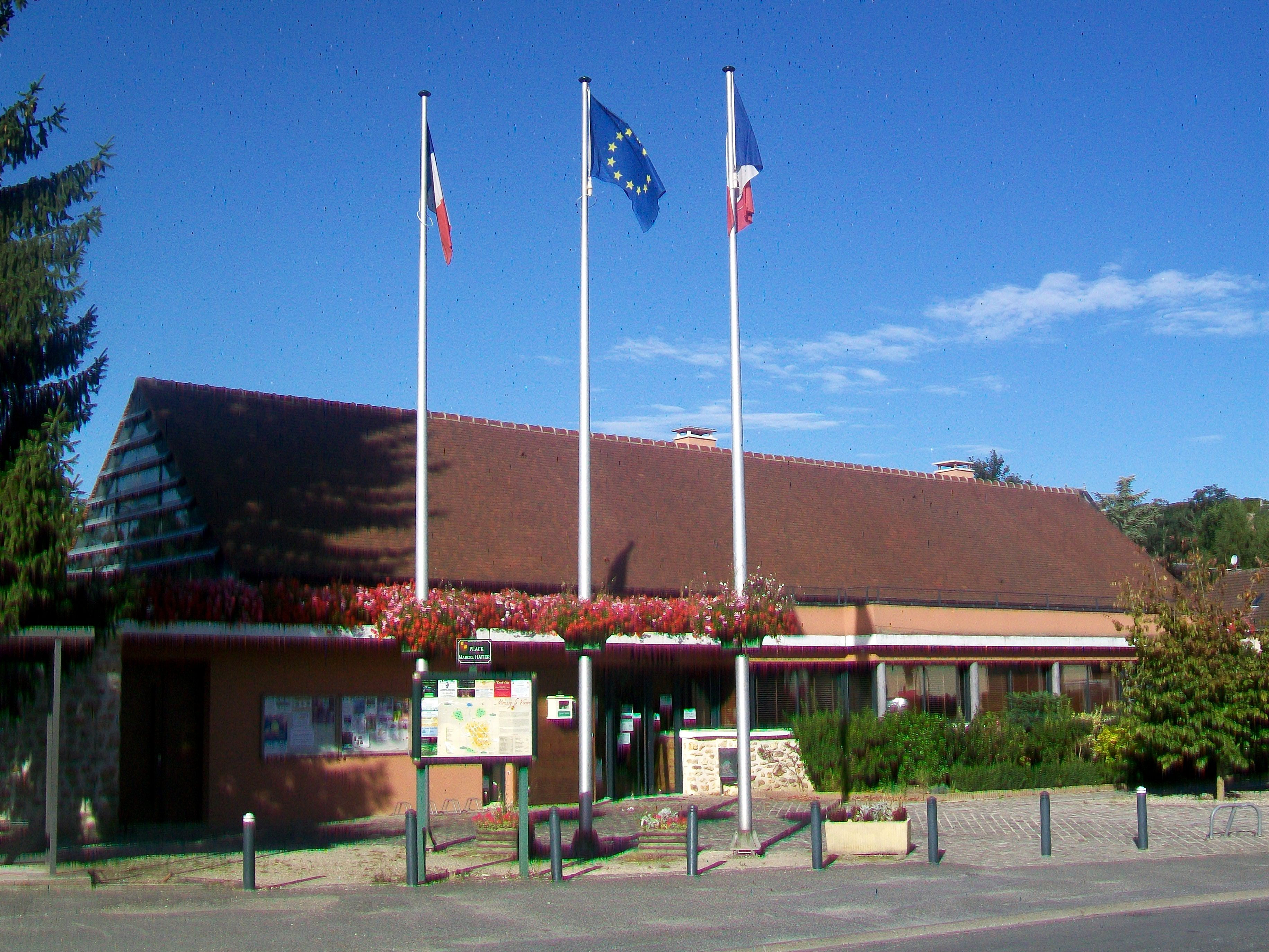 La mairie, rue de Paris.